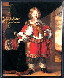 Markgraf Johann Friedrich von Brandenburg-Ansbach (1654-1686)